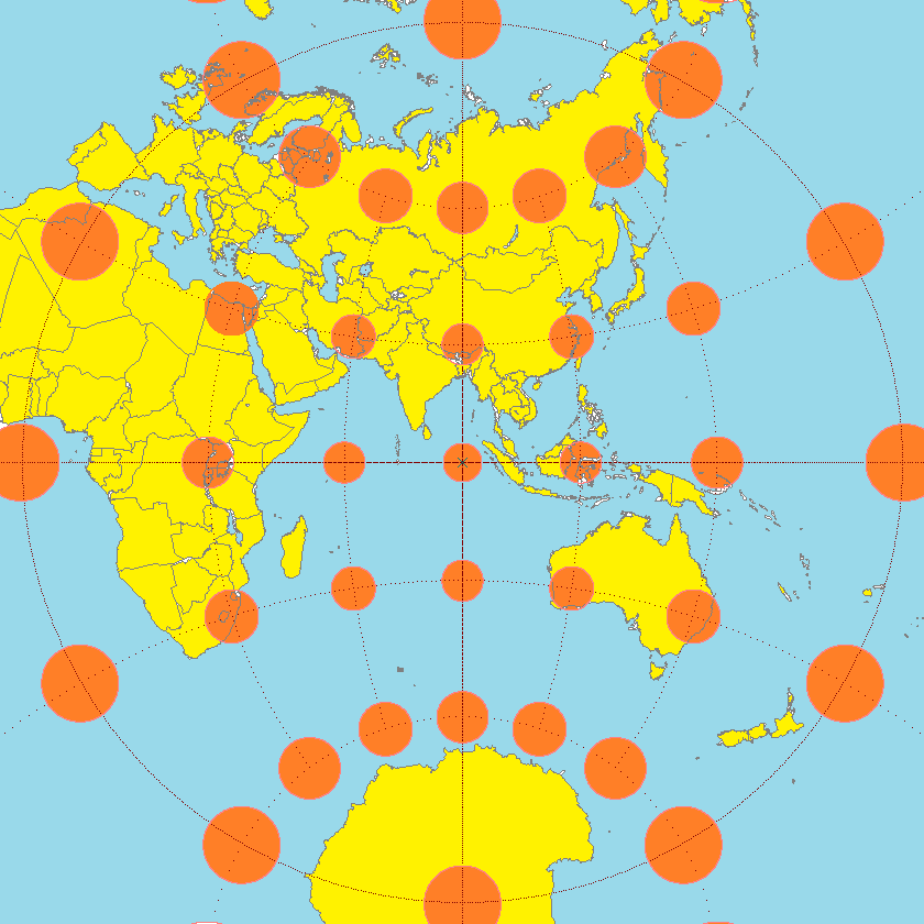 平射図法の場合のテイソーの指示楕円